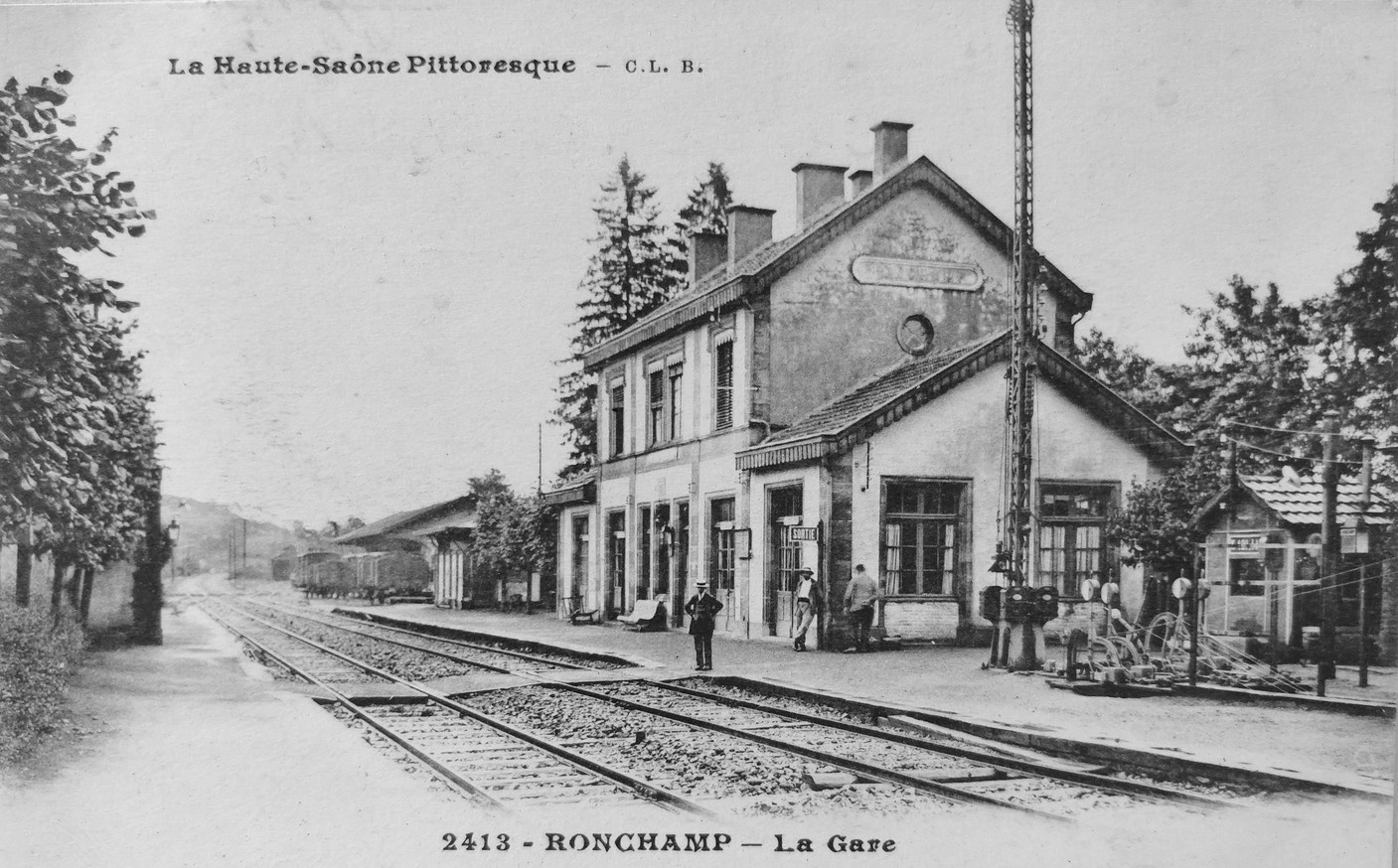 Le bâtiment voyageurs de la gare de Ronchamp au début des années 1900.